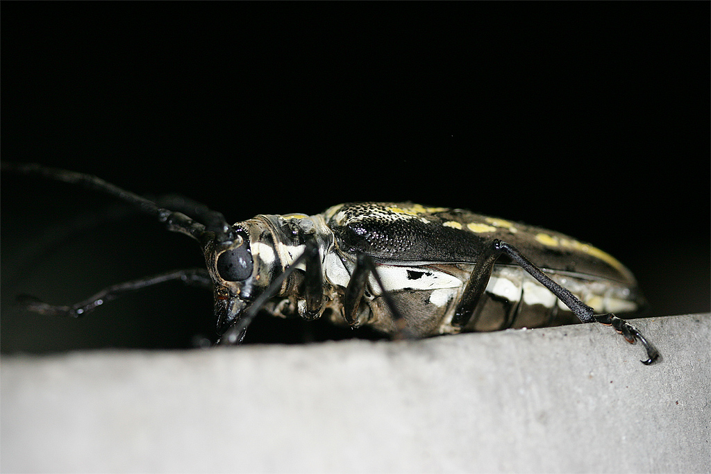 Batocera lineolata from JapanBatocera lineolata